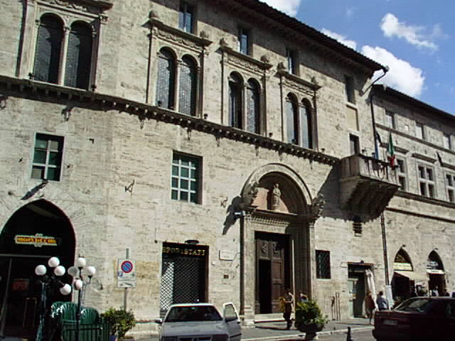 Perugia, Palazzo del Capitano del Popolo, oggi sede del Tribunale